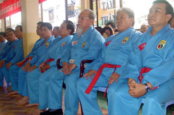 To Duong Vovinam